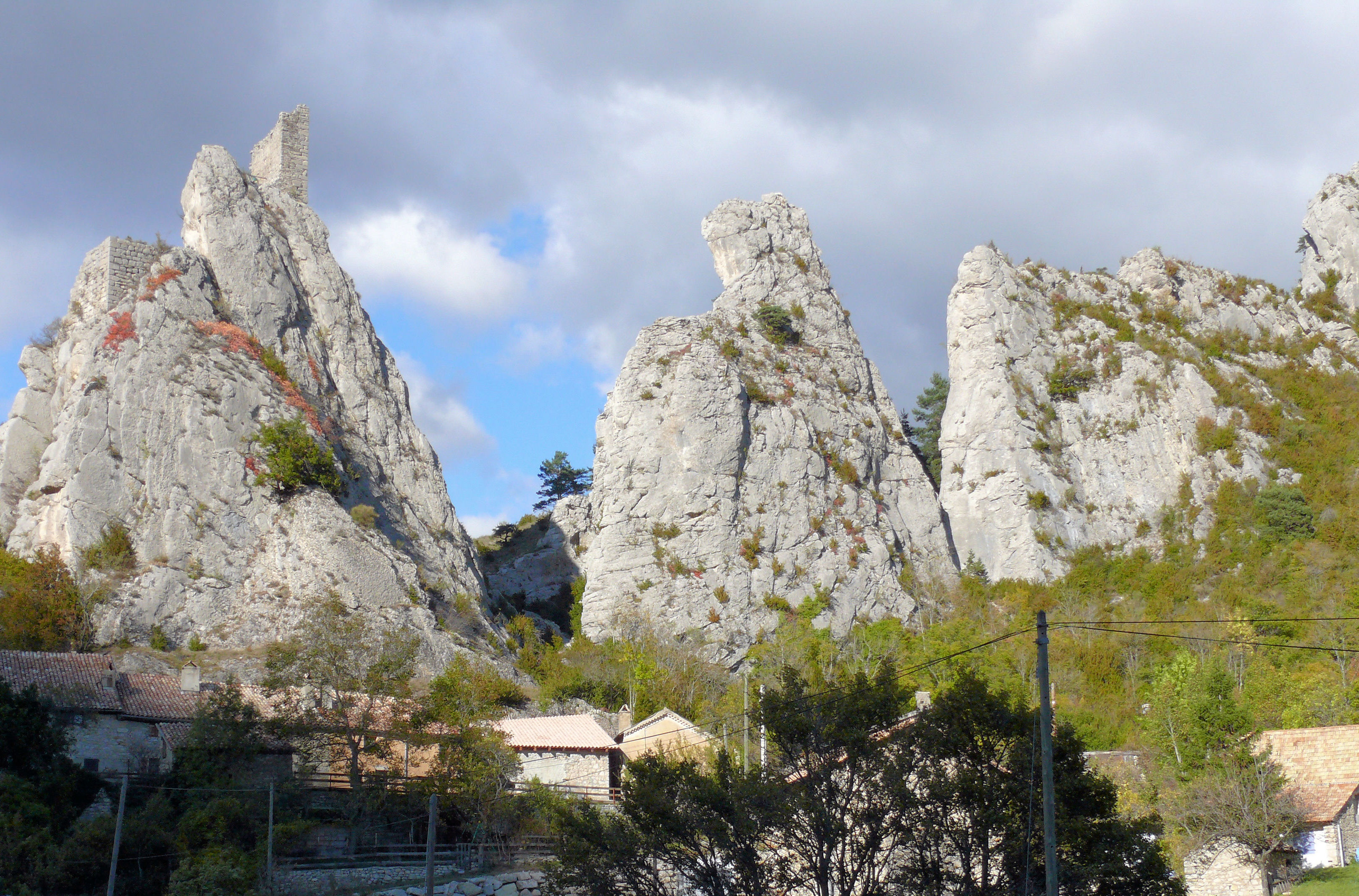 La Rochette, barre rocheuse et hameau